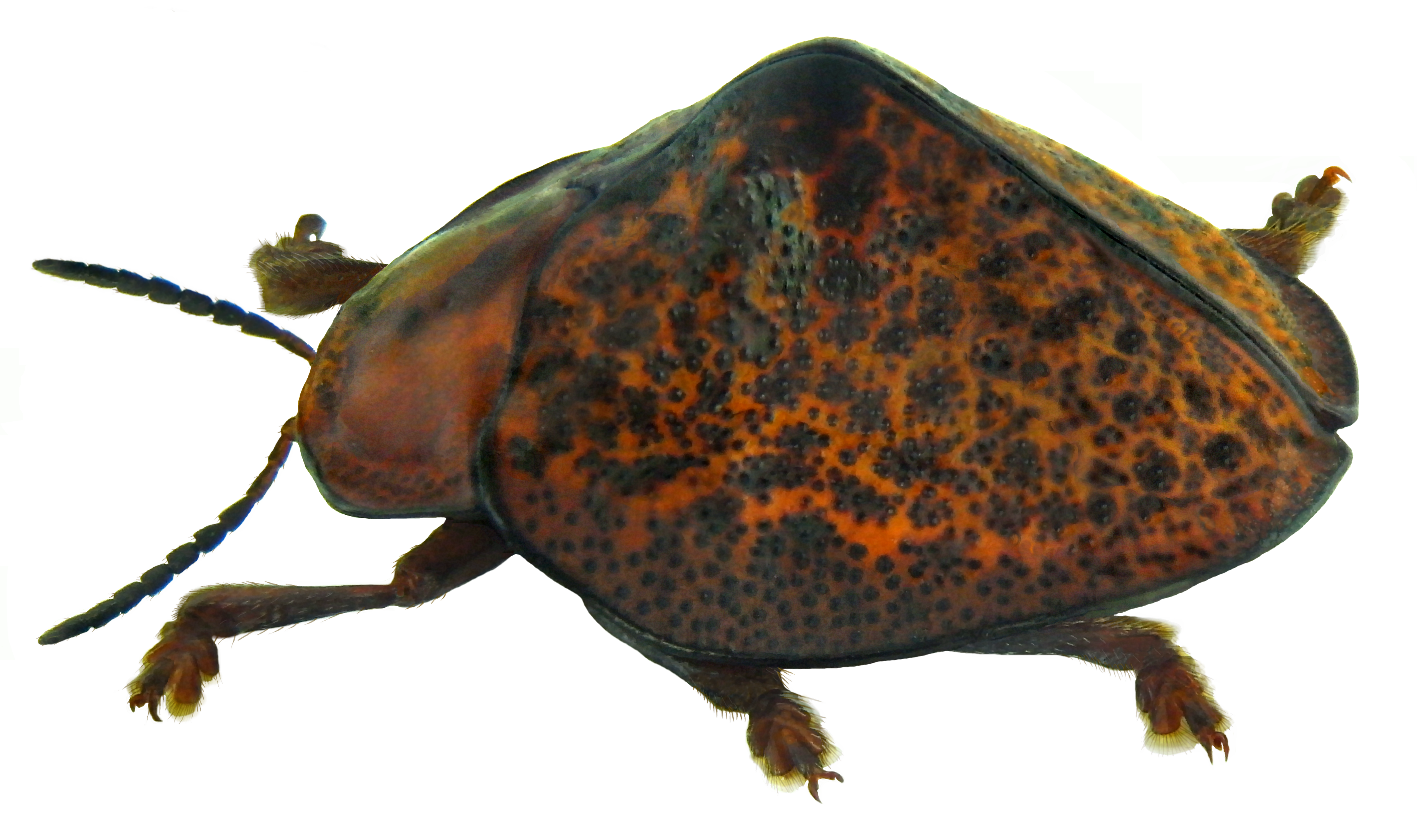 Family: Chrysomelidae Size: 9.5 mm Location: Brazil, Rio de Janeiro State, Mangaratiba leg U.Schmidt, 1992, det. L.Borowiec 2011, Photo: U.Schmidt, 2011